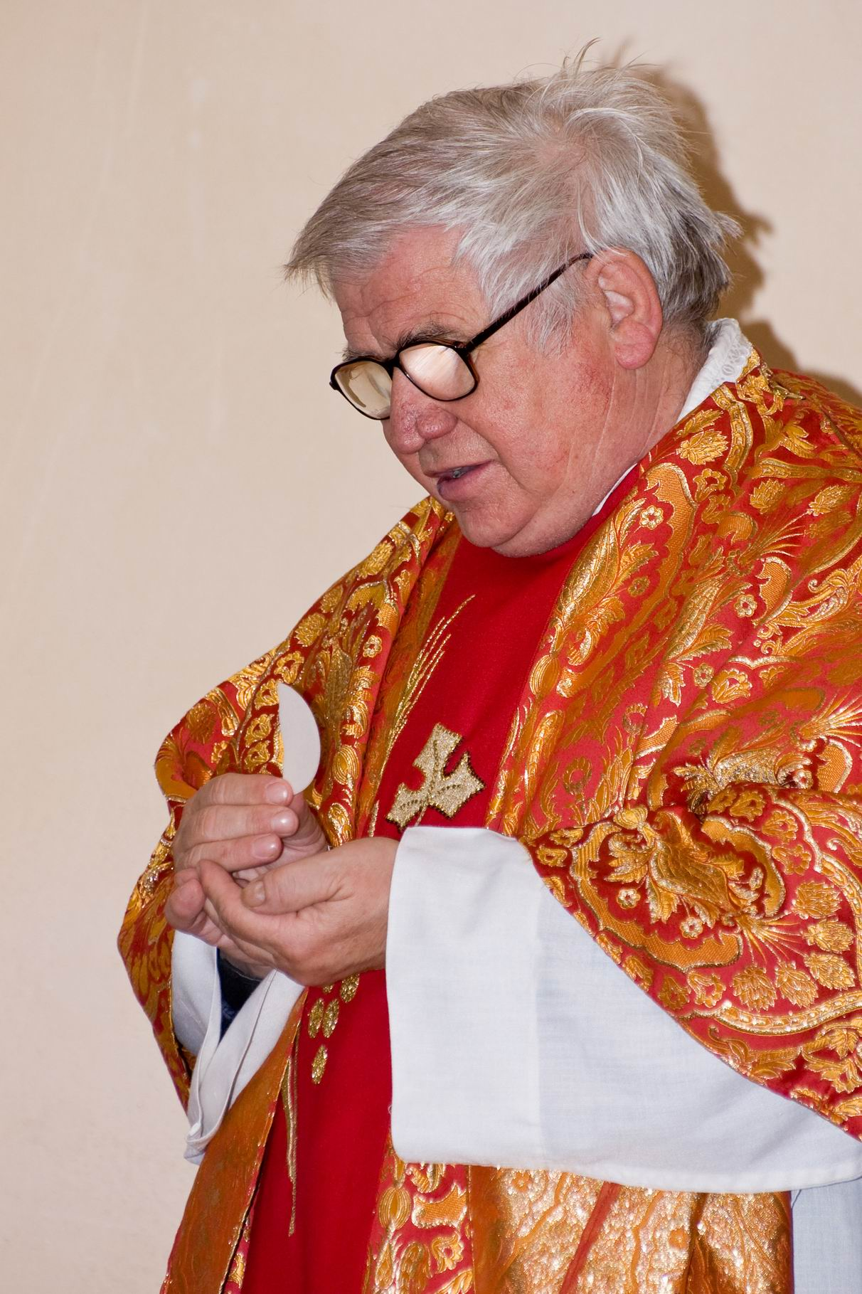 svátost biřmování v Moravanech